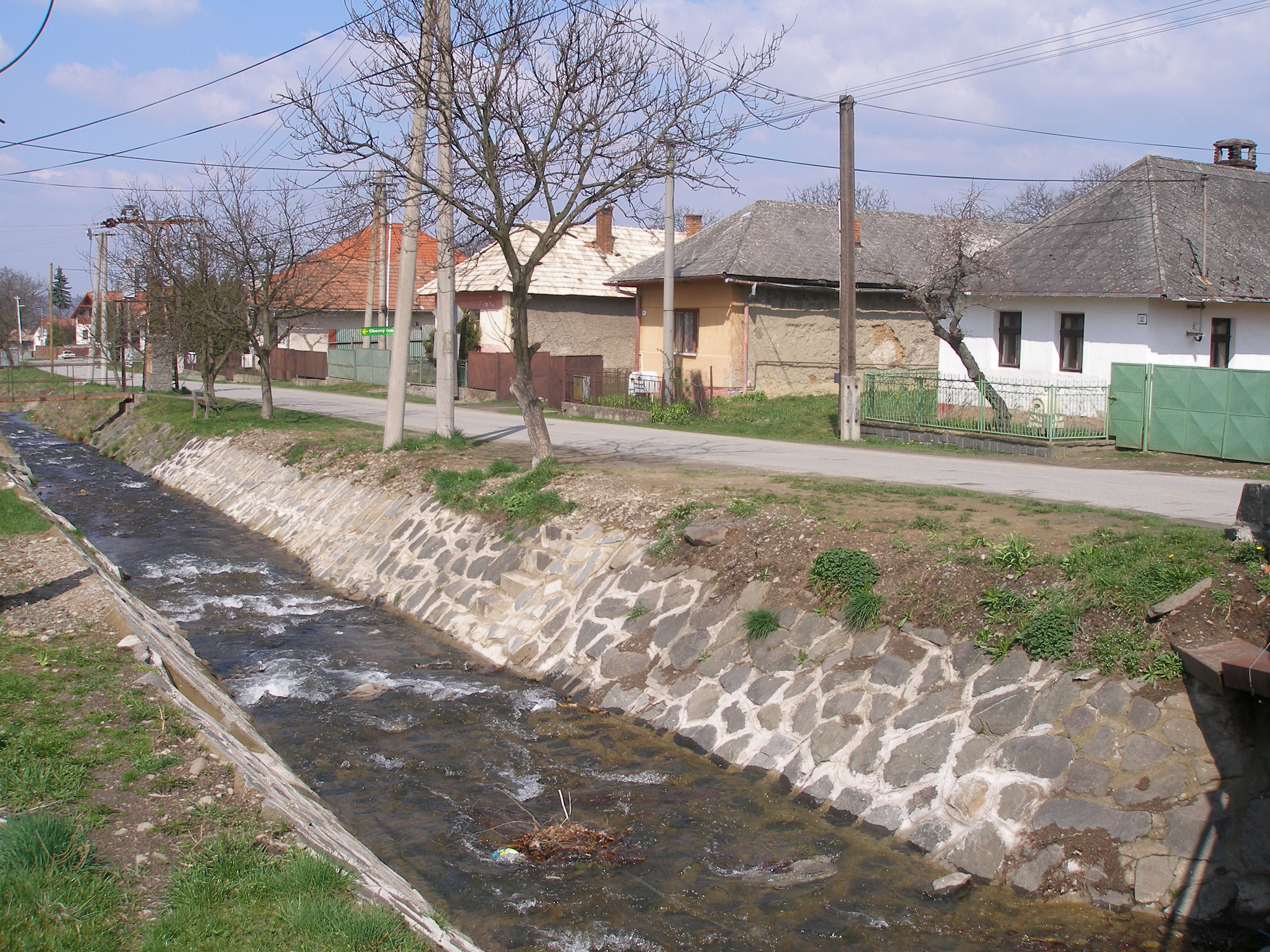 Obec Vyšná Šebastová okres Prešov, región Šariš